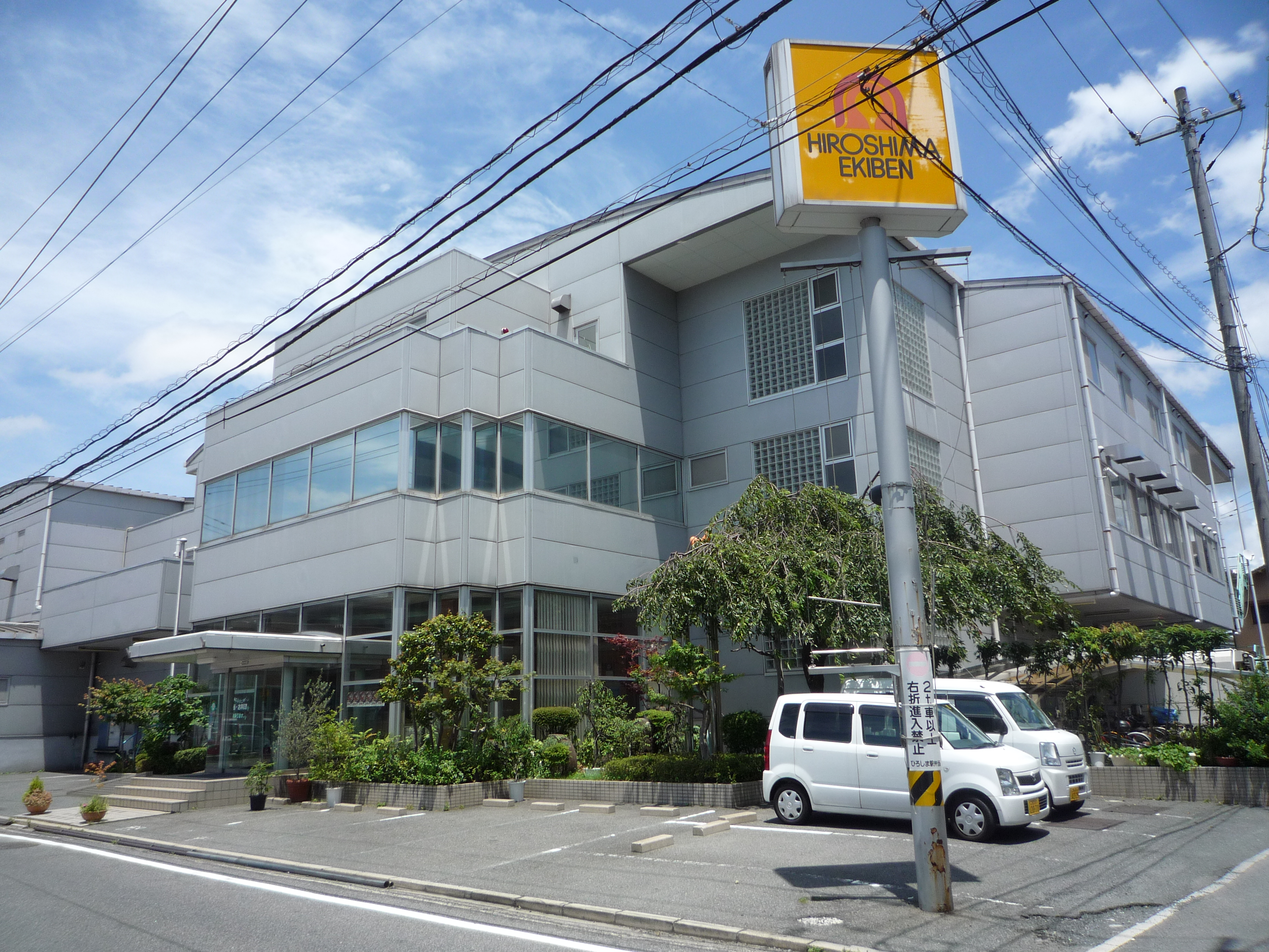 広島駅弁当 本社